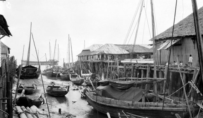 Repronegatief. Bagan-siapiapi (ook wel geschreven als Bagan Si Api Api), aan de mond van de rivier de Rokan, het belangrijkste centrum voor visserij op Sumatra, werd bijna uitsluitend door Chinezen bewoond, onder wie veel nieuwkomers. De onderafdeling en de gelijknamige hoofdplaats ontwikkelden zich snel rond 1900 dankzij de rijkdom aan vis en garnalen van de zee rond die streek, Straat Malakka. Een groot deel van de vangst werd in de vorm van gedroogde vis en trasi (terasi, een sterk ruikend bestanddeel van diverse Indische levensmiddelen) naar Singapore en Batavia verscheept. (P. Boomgaard, 2001). Vissershaven in Bagan Siapi-api, Oost-Sumatra